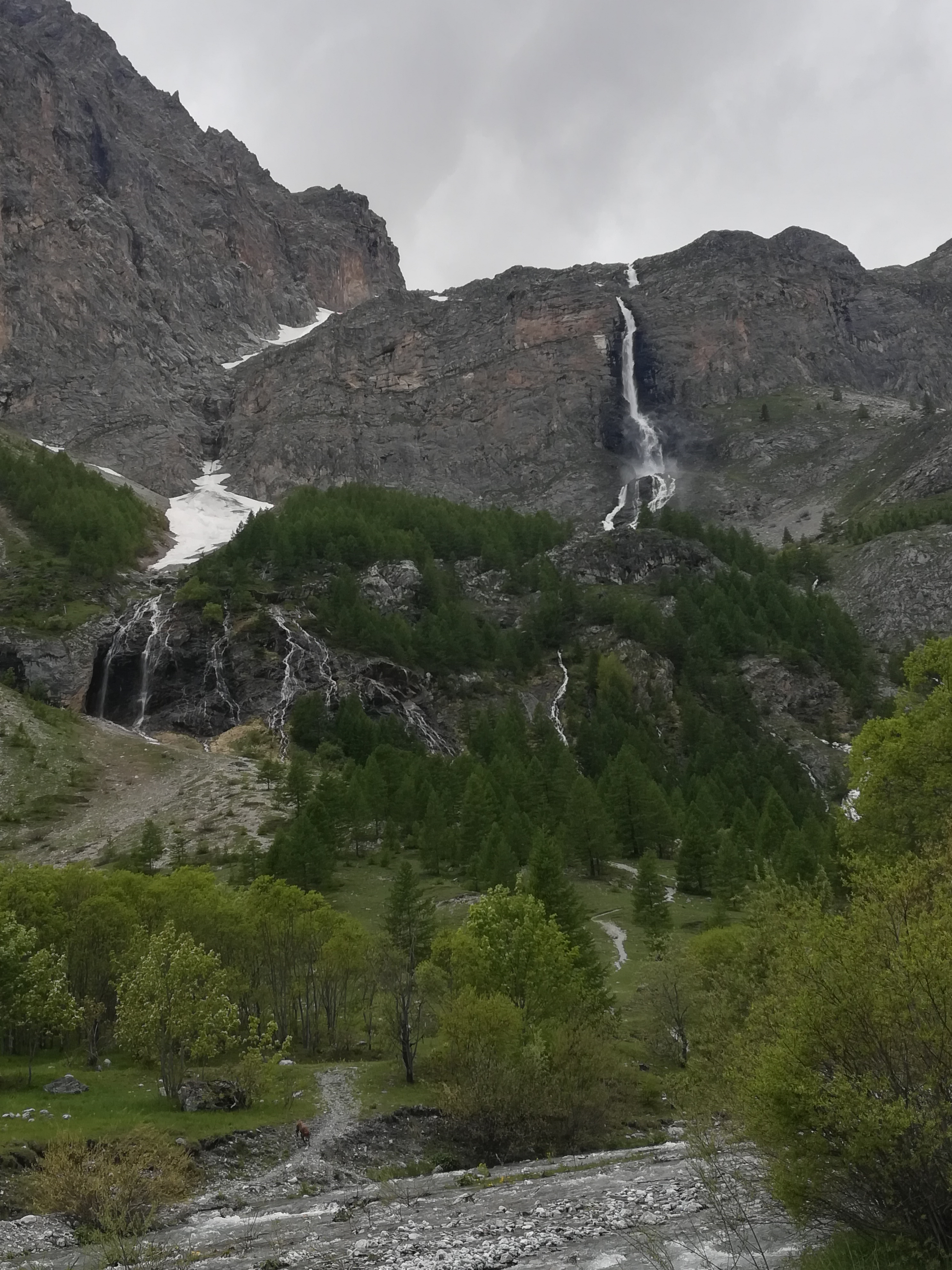 Alte Valli Stura e Maira (Q47364759)